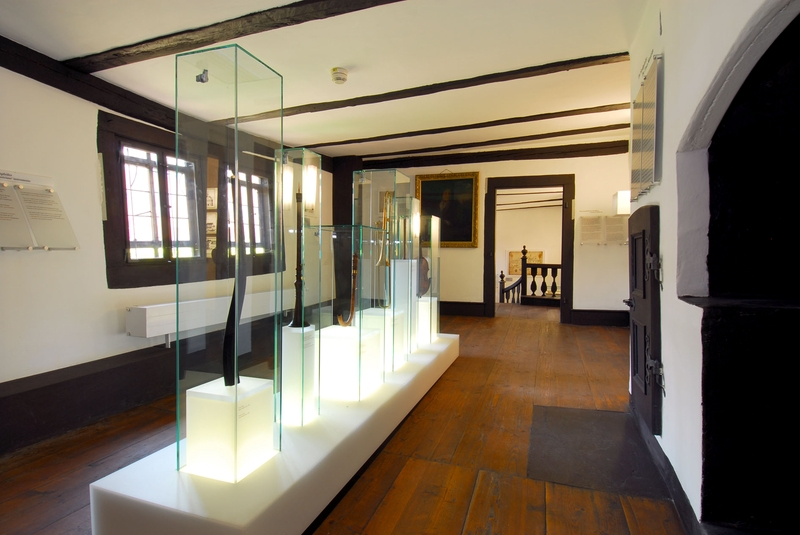 Bachhaus Eisenach, Stadtpfeiferraum